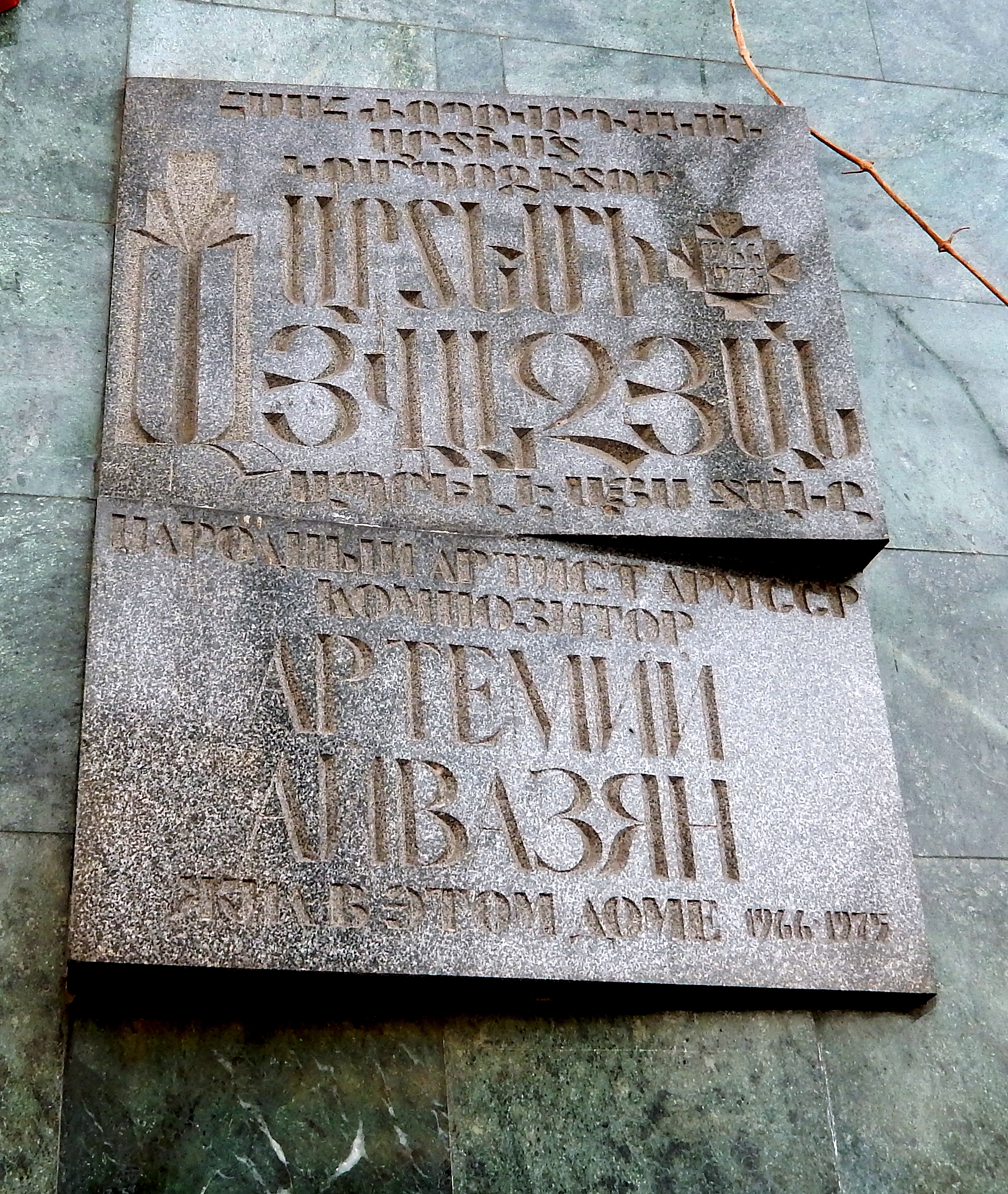 Արտեմի Այվազյանի հուշատախտակը Երևանի Սայաթ-Նովա փողոցում